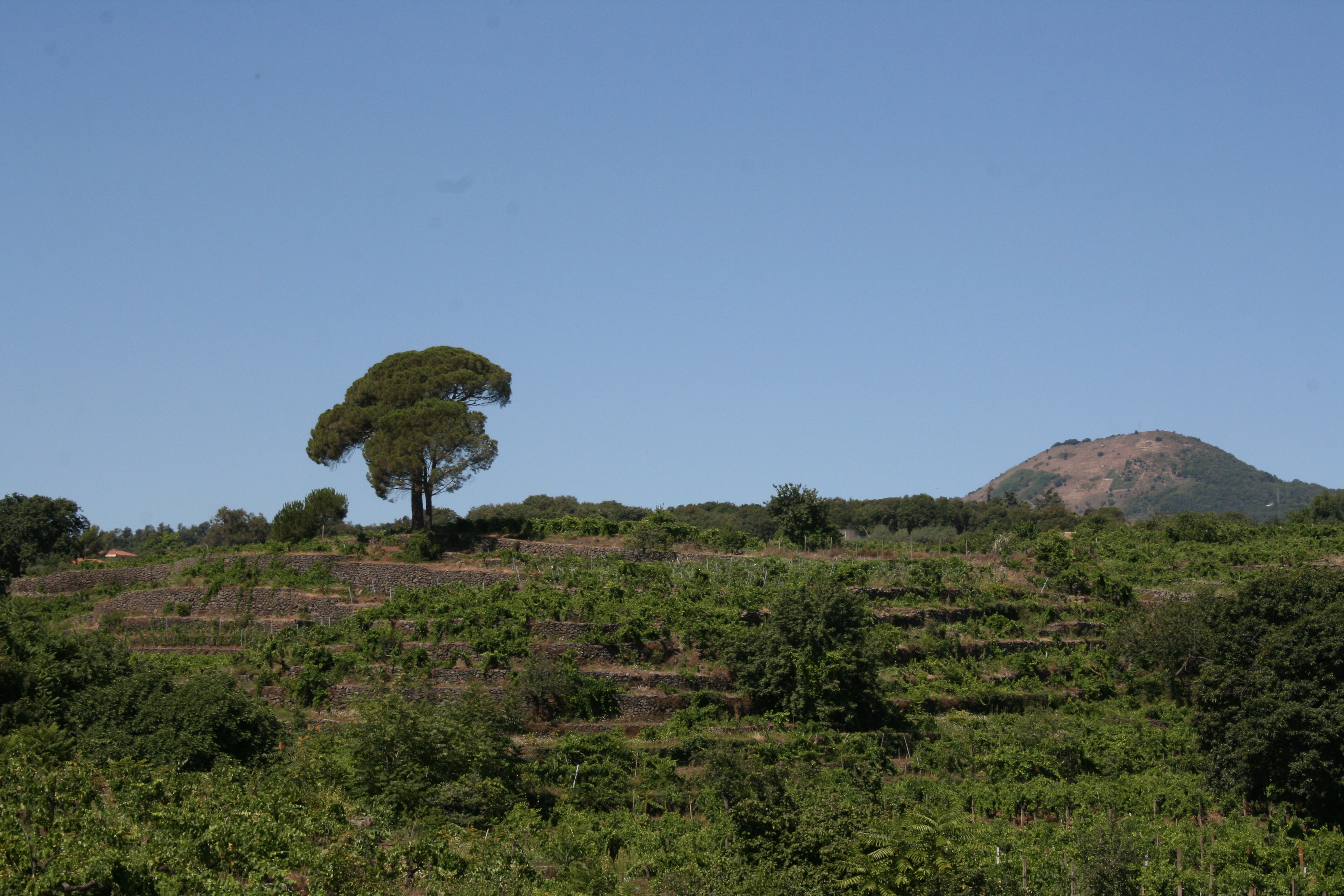 Foto dei pini caratteristici simbolo della frazione di Cosentini in Santa Venerina (Catania).